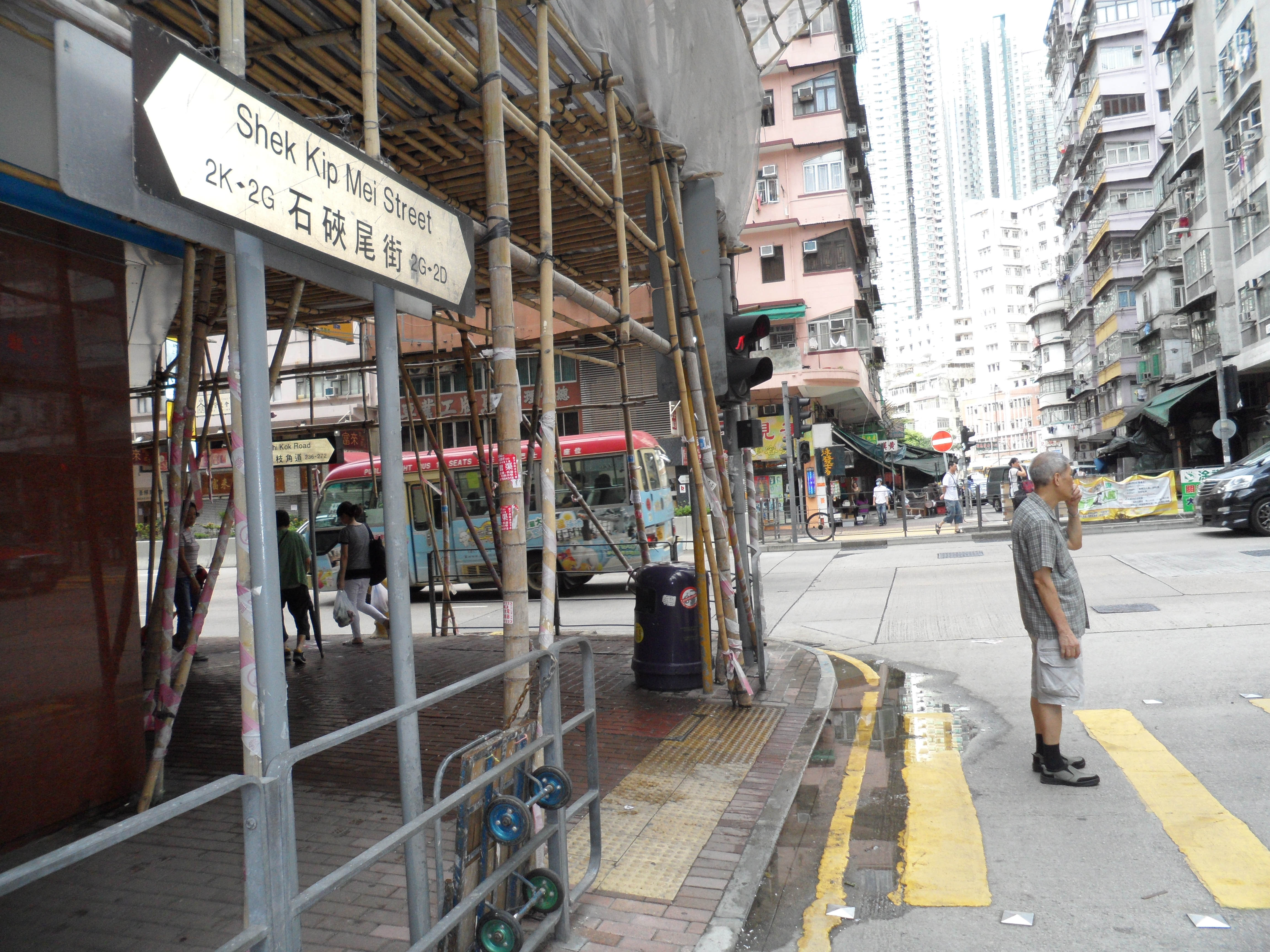 石硤尾街鄰近荔枝角道路段